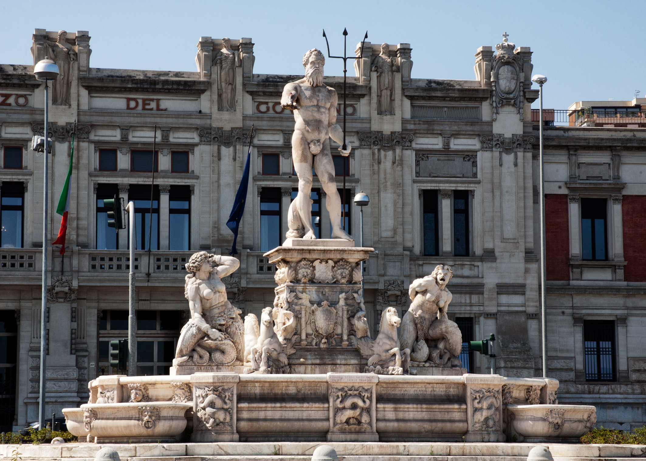 Fontana del Nettuno This is a photo of a monument which is part of cultural heritage of Italy.